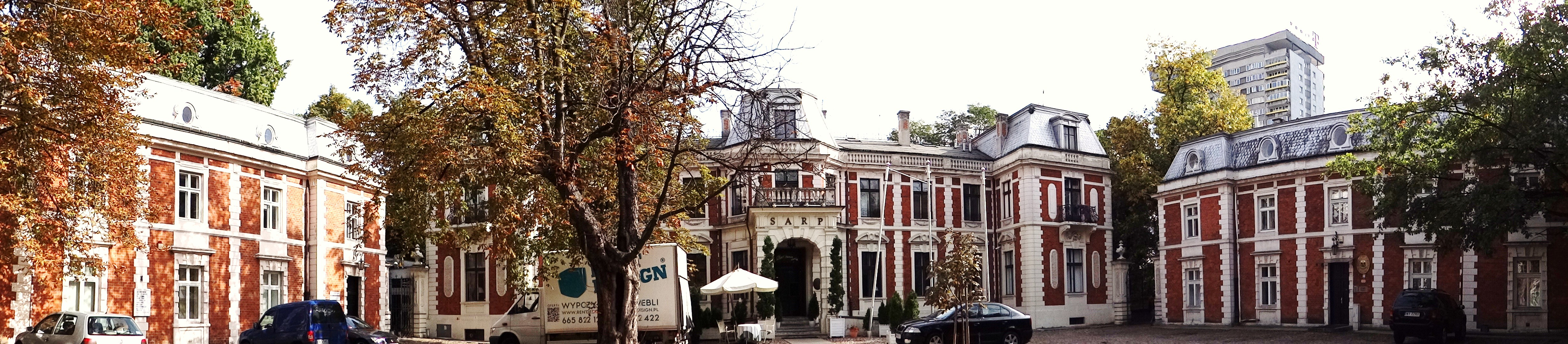 Pałac Zamojskich na ulicy Foksal - widok ogólny pałacu wraz z oficynami